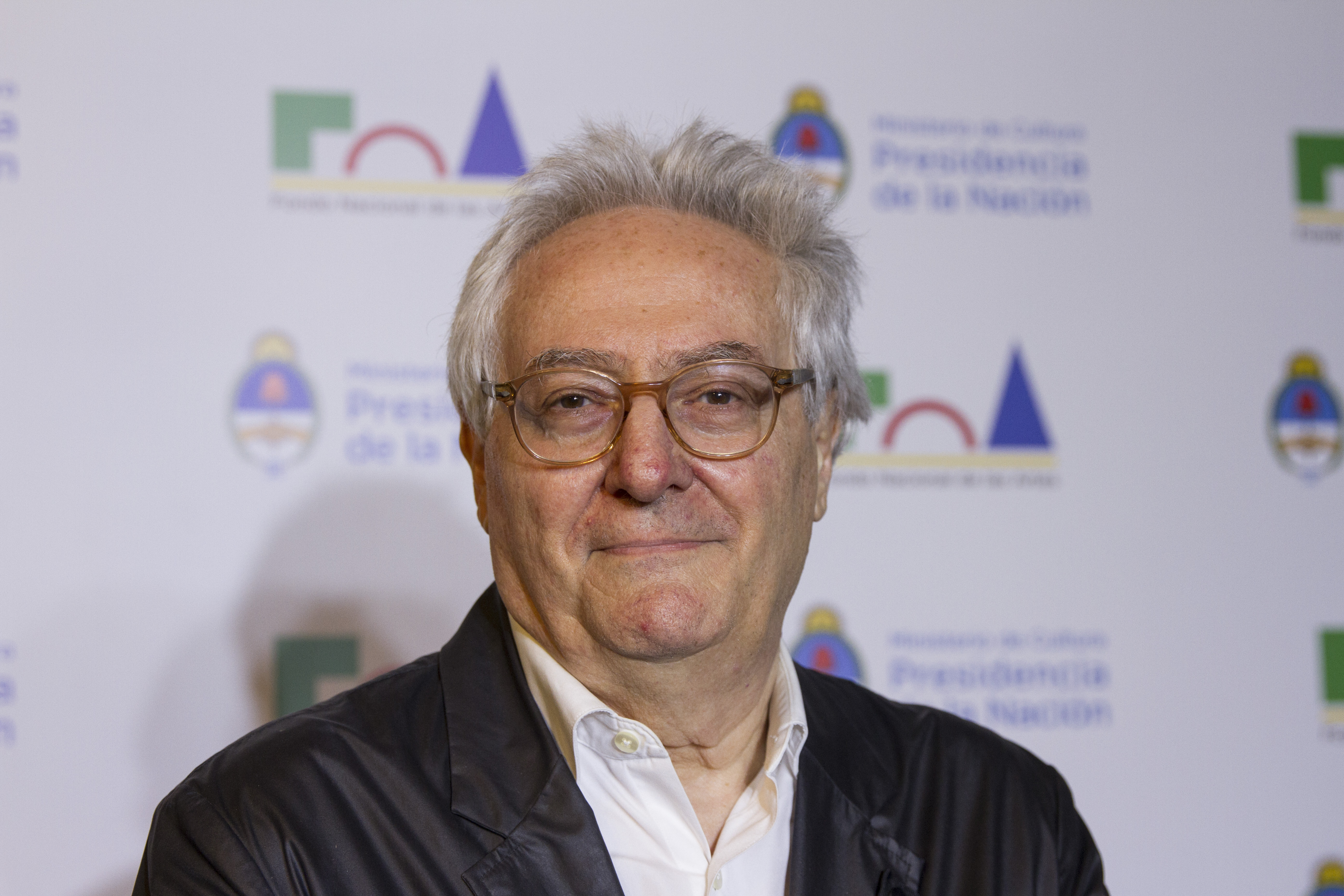 Buenos Aires, 4 de diciembre de 2017 - Se entregaron los "Premios a la Trayectoria del Fondo Nacional de las Artes" en el Teatro Cervantes - Teatro Nacional Argentino. El ministro de Cultura, Pablo Avelluto entregó el gran premio a José Martínez Suárez. Fotos: Romina Santarelli / Ministerio de Cultura de la Nación.